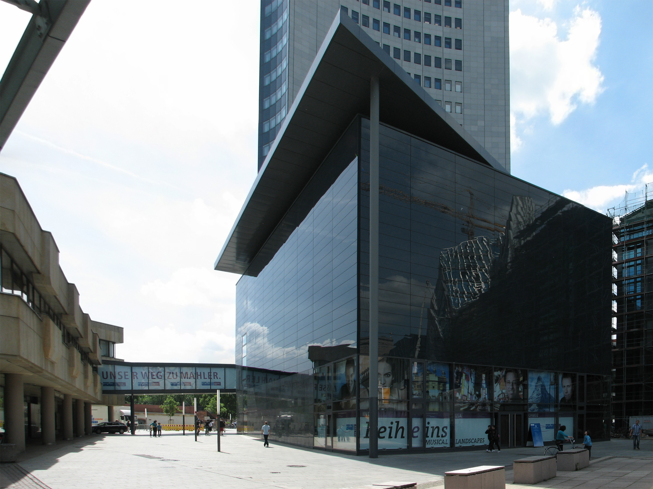 Panorama des MDR-Kubus von Nordost aus gesehen. Am linken Rand ist das Gewandhaus zu sehen, welches durch eine Brücke mit dem Kubus verbunden ist. Hinter dem Kubus selbst ist das City-Hochhaus sichtbar. Das im Bau befindliche Gebäude am rechten Rand ist der Neubau des Hauptgebäudes der Universität Leipzig.